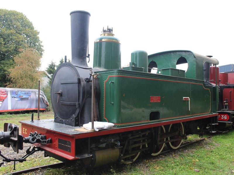 030T Corpet-Louvet 691 "Clarisse" à Crevecœur-le-Grand